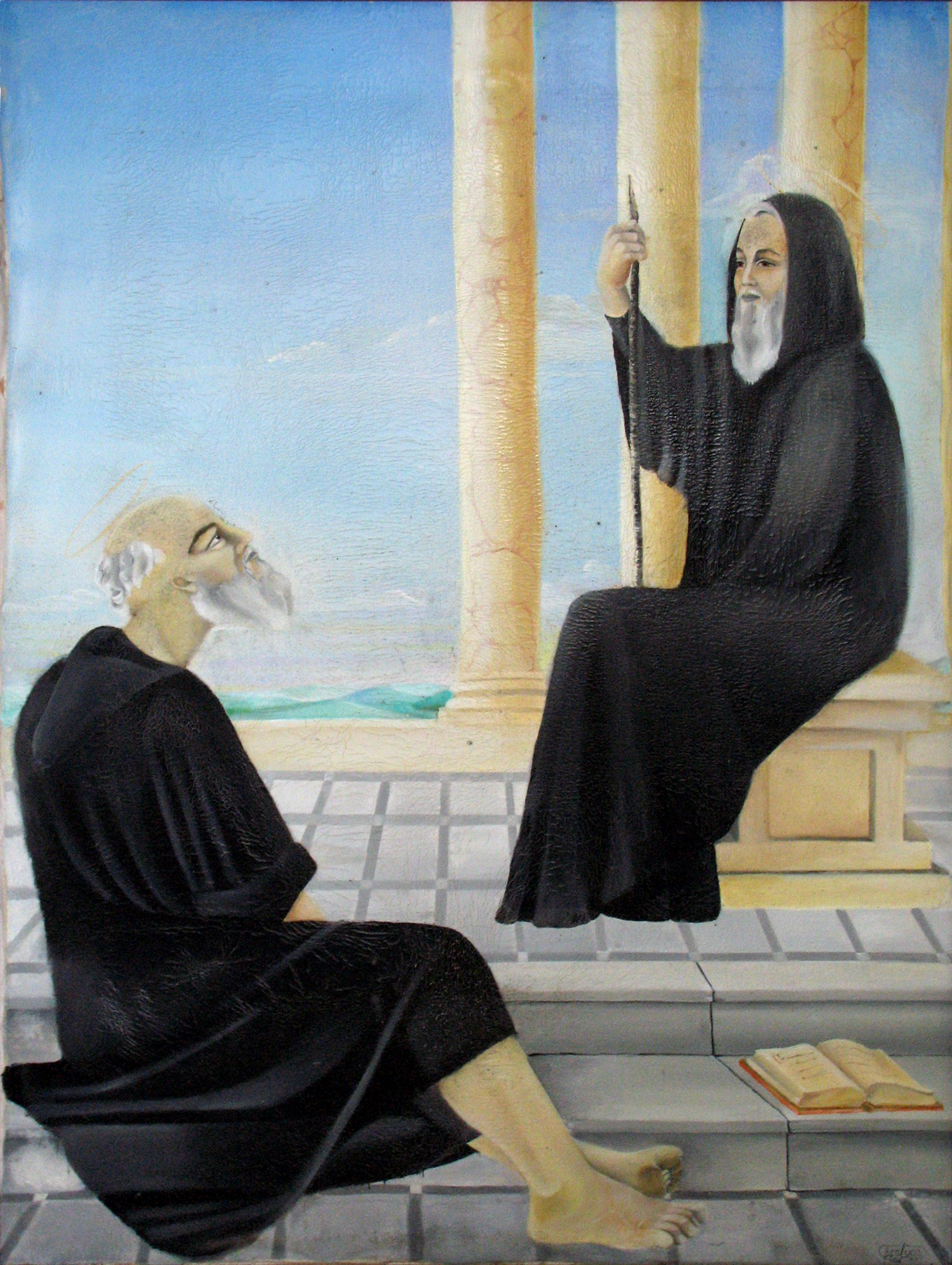 Ritratto di San Fantino presso il Santuario di San Nicodemo, Mammola (RC)